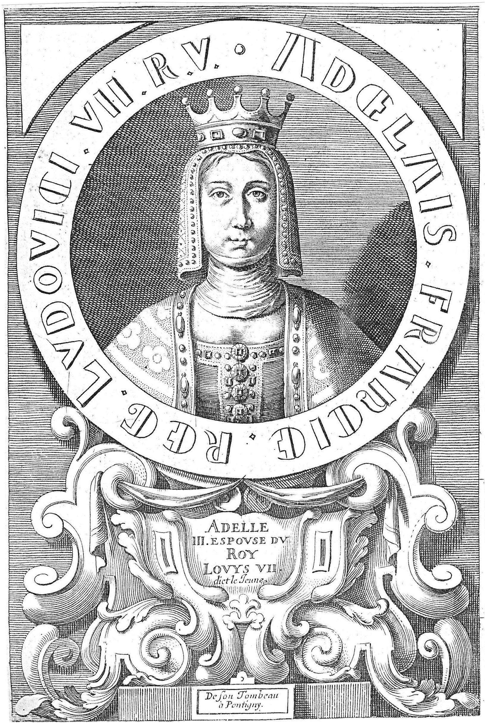 Buste de la reine Adèle de Champagne (+ 1206), « tiré de son tombeau à Pontigny », par le graveur Remy Capitain, collaborateur de Jacques de Bie, représentée de face, la tête recouverte d’une coiffe et d’une couronne, vêtue d’une robe et d’un manteau ornés de broderies et de pierreries. Légende circulaire : « ADELAIS FRANCIE REG LUDOVICI VII R U » [Adèle, reine de France, épouse du roi Louis VII]. Légende en français sur un cartouche : « Adelle, III. espouse du roy Louys VI dict le Jeune » [Adèle, 3e épouse du roi Louis VII dit le Jeune].